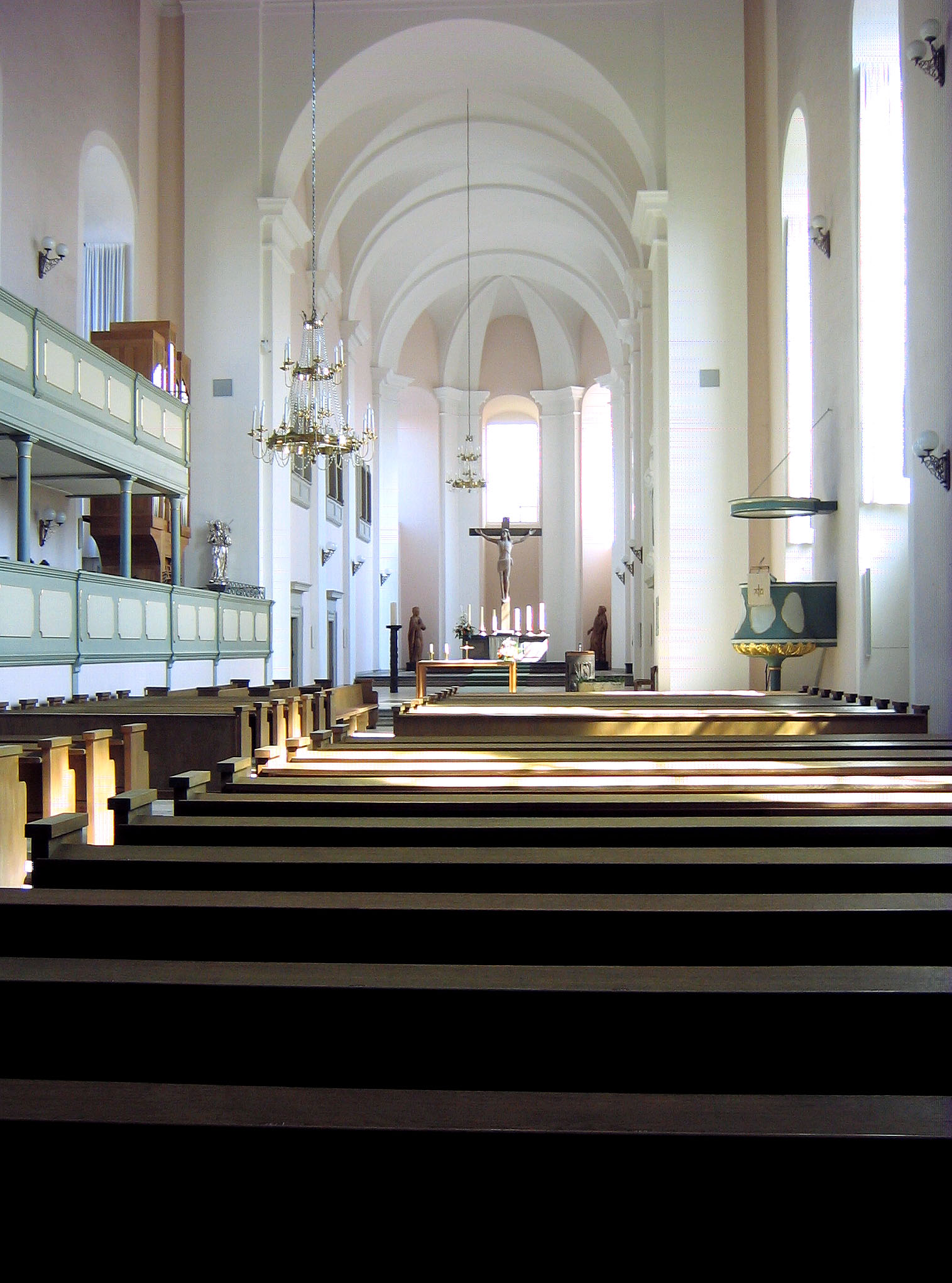 Innenansicht der Petrinikirche (Stadtkirche) von Kitzingen / Main